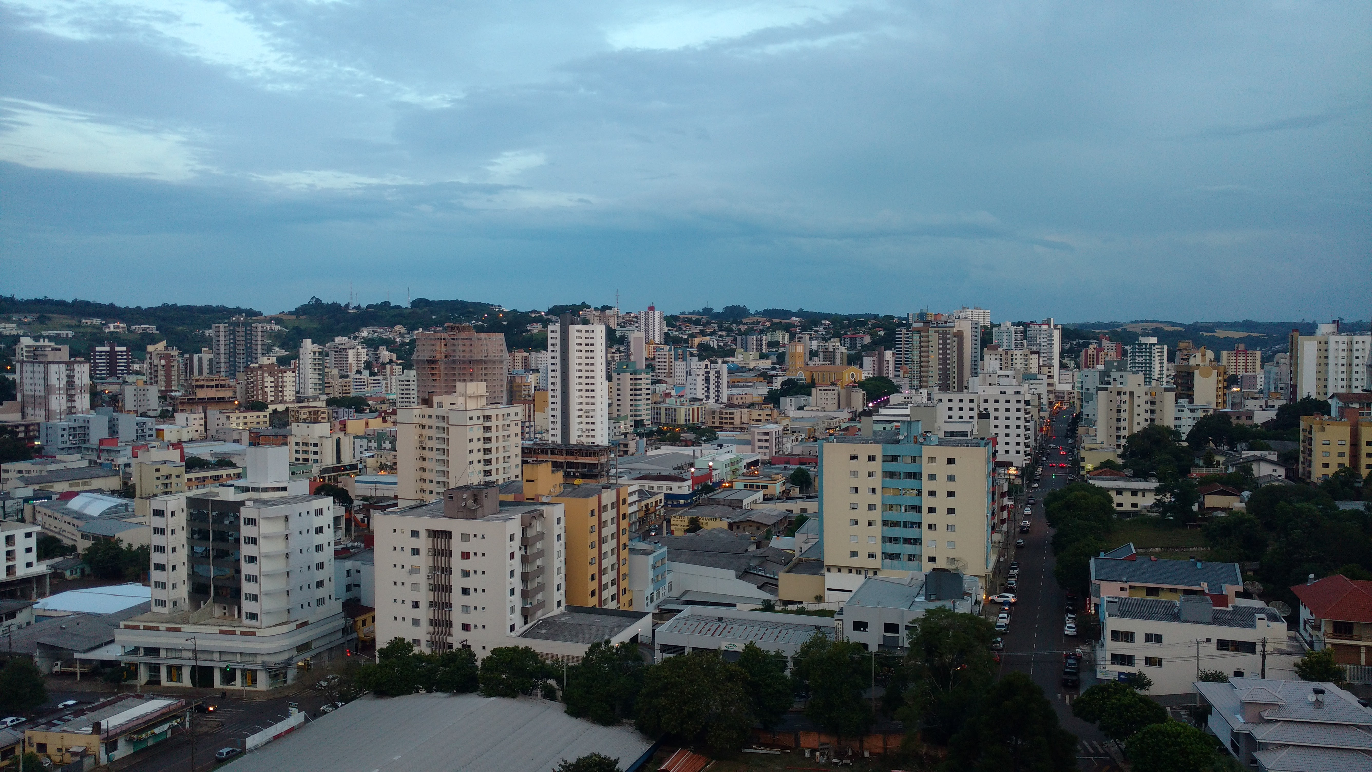 Centro de Pato Branco